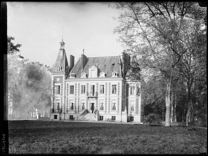 Vue du château La Grange Feu Louis à Évry (Essonne au XIXe siècle, détruit aujourd'hui